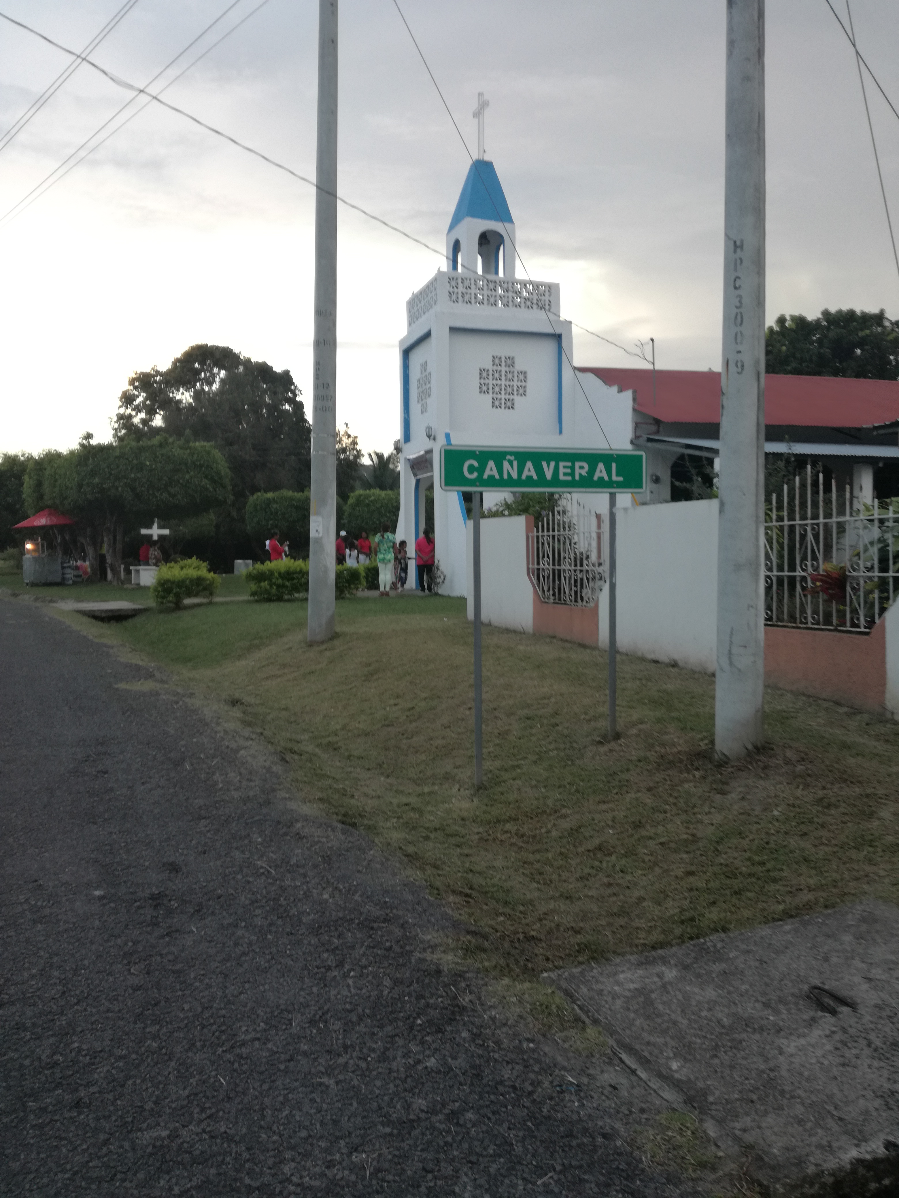 Iglesia principal del corregimiento.